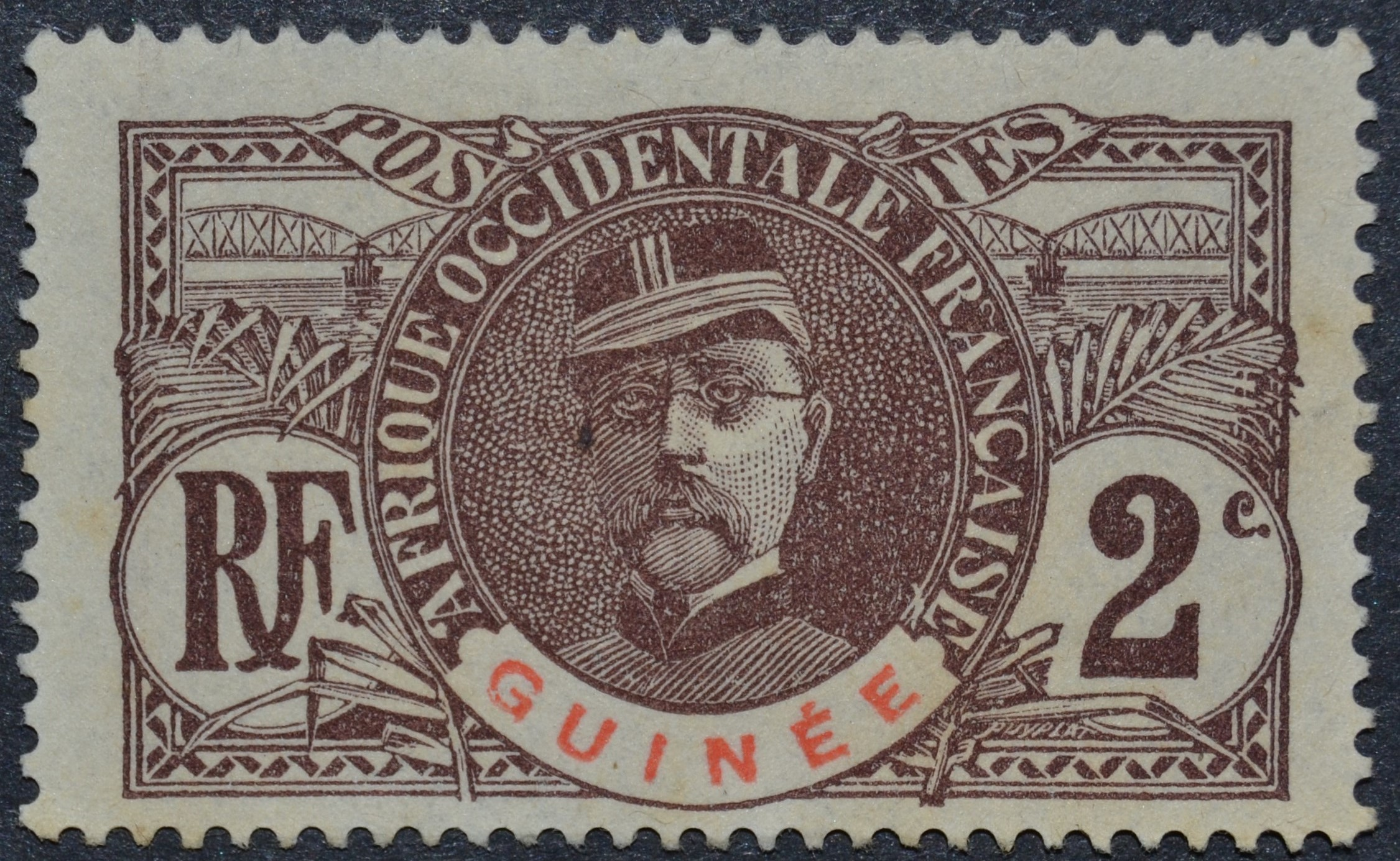 Stamp of French Guinea, 2c, 1906 key type stamp of Louis Léon César Faidherbe